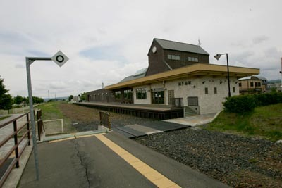 旧ふるさと銀河線の訓子府駅